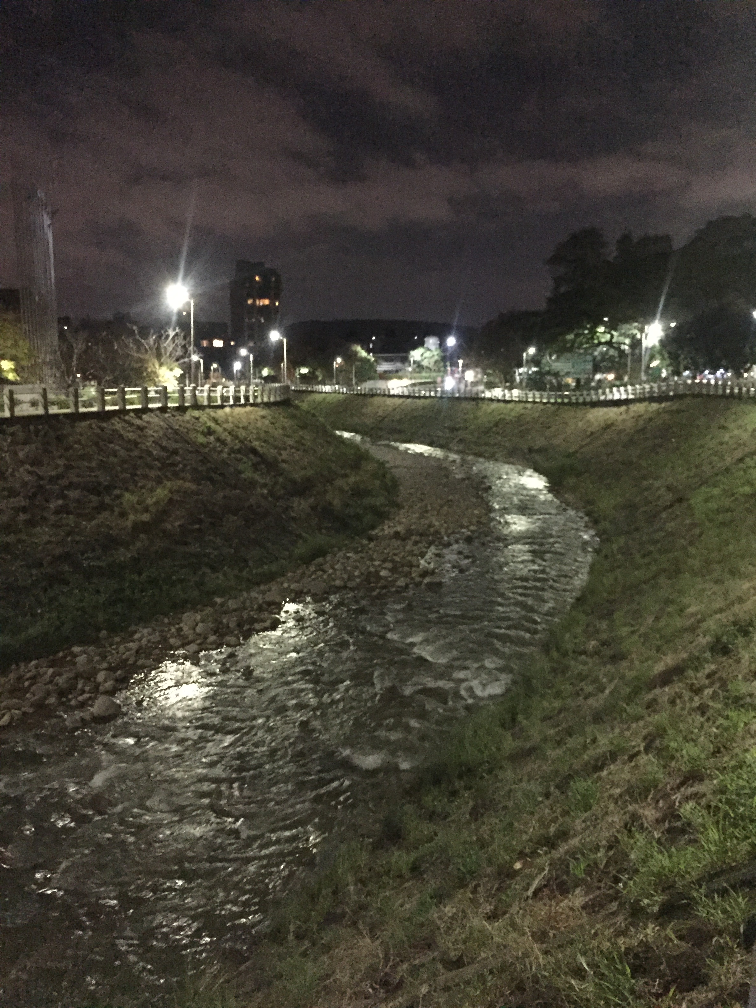 臺灣台北市磺溪之夜景